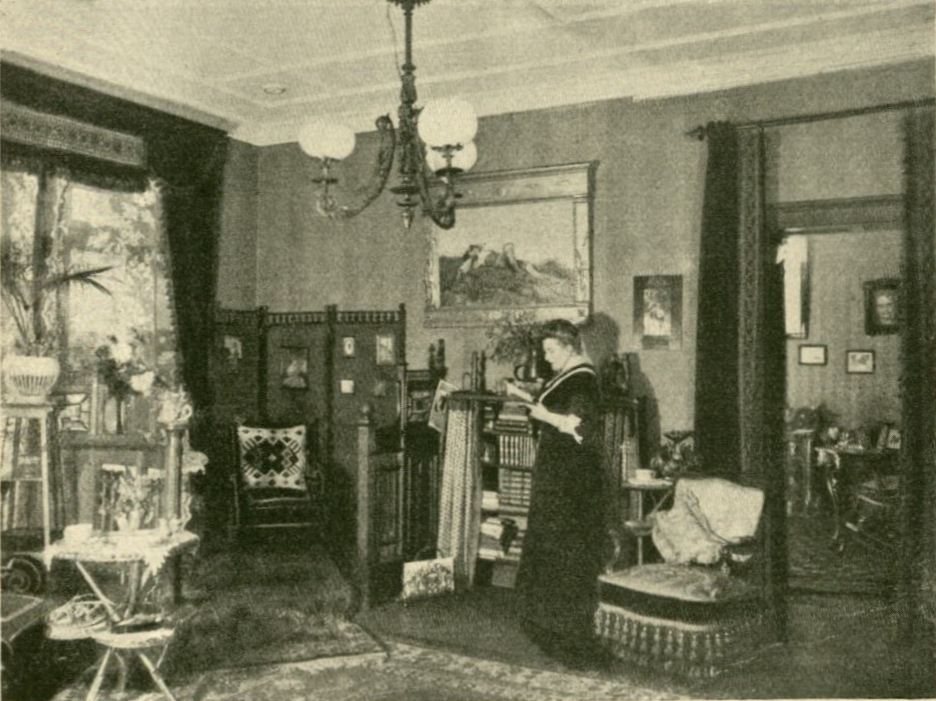 Alexandrine Rossi (1861–1953), Stuttgarter Hof- und Staatsschauspielerin, beim Rollenstudium in ihrer Wohnung.